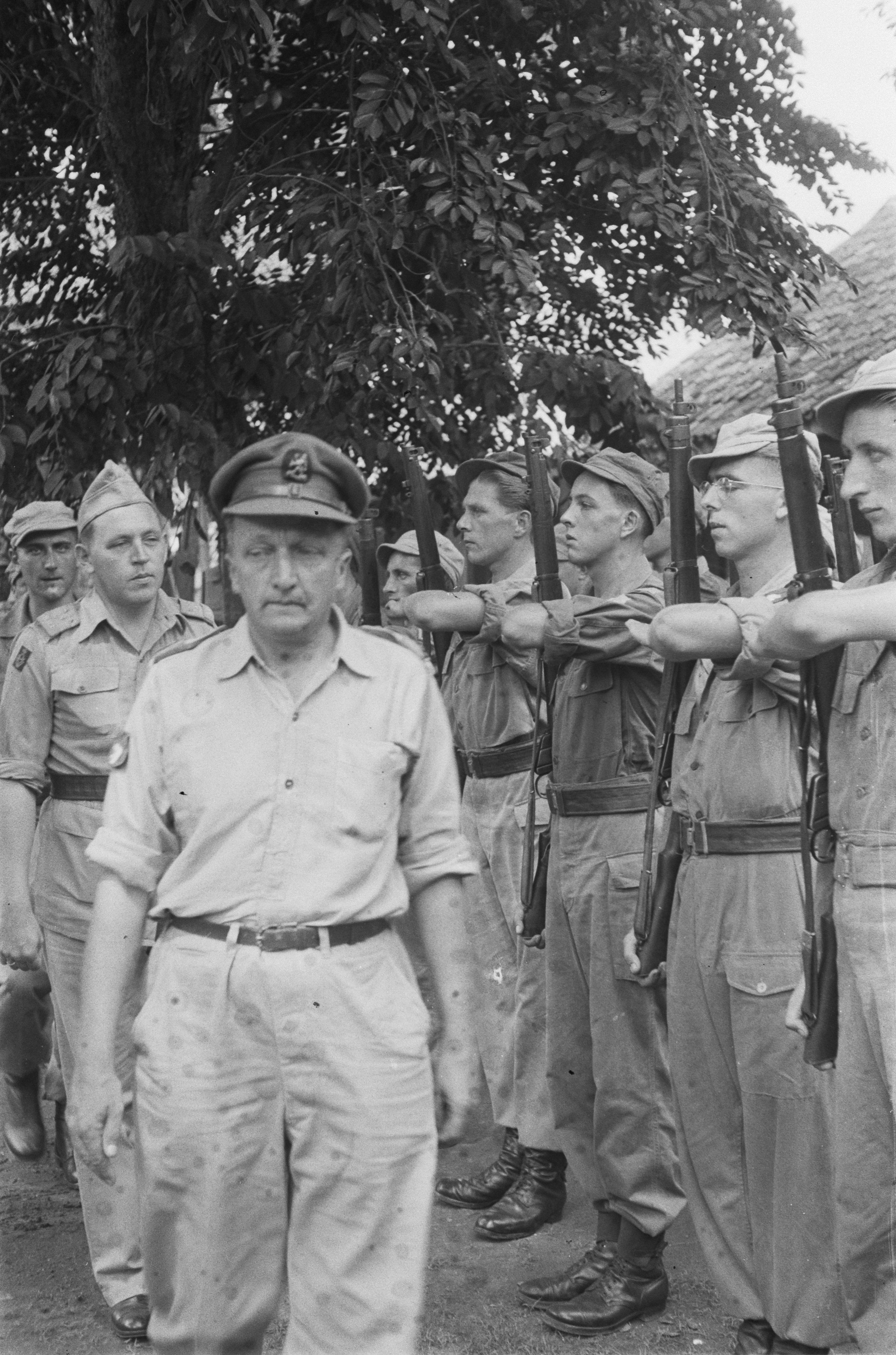 Afscheid van kolonel Baas Becking. Afscheid door de compagnie 2-1-8 R.I. van kolonel prof. dr. L.M.G. Baas Becking, leider van de Mobile Teams van het Nederlands-Indische Rode Kruis, in zijn huis te Molenvliet. De kolonel inspecteert de troepen. 20 november 1946